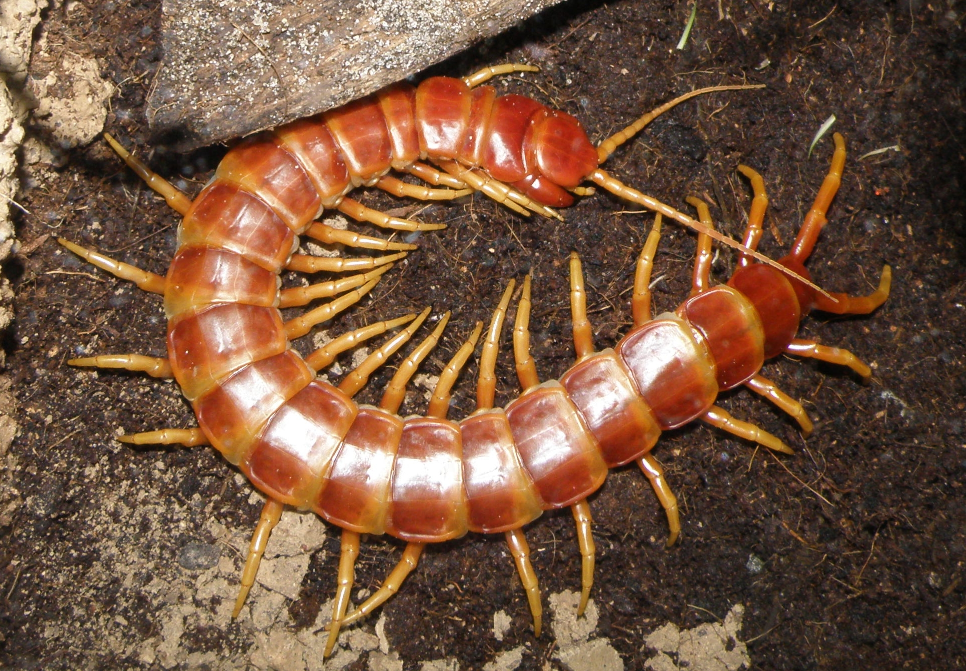 Scolopendra spinipriva, Ogród Zoologiczny w Warszawie